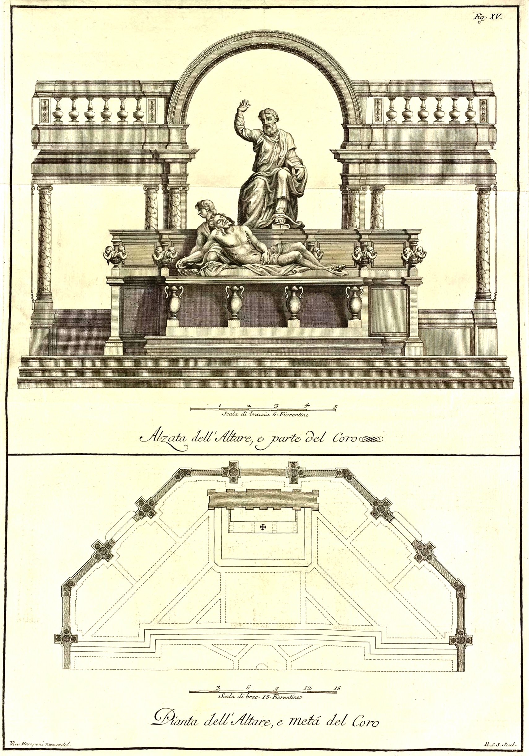 Bernardo Sansone Sgrilli, Descrizione e studi dell'insigne fabbrica di S. Maria del Fiore, Metropolitana Fiorentina, in varie carte (1733), fig. XV.